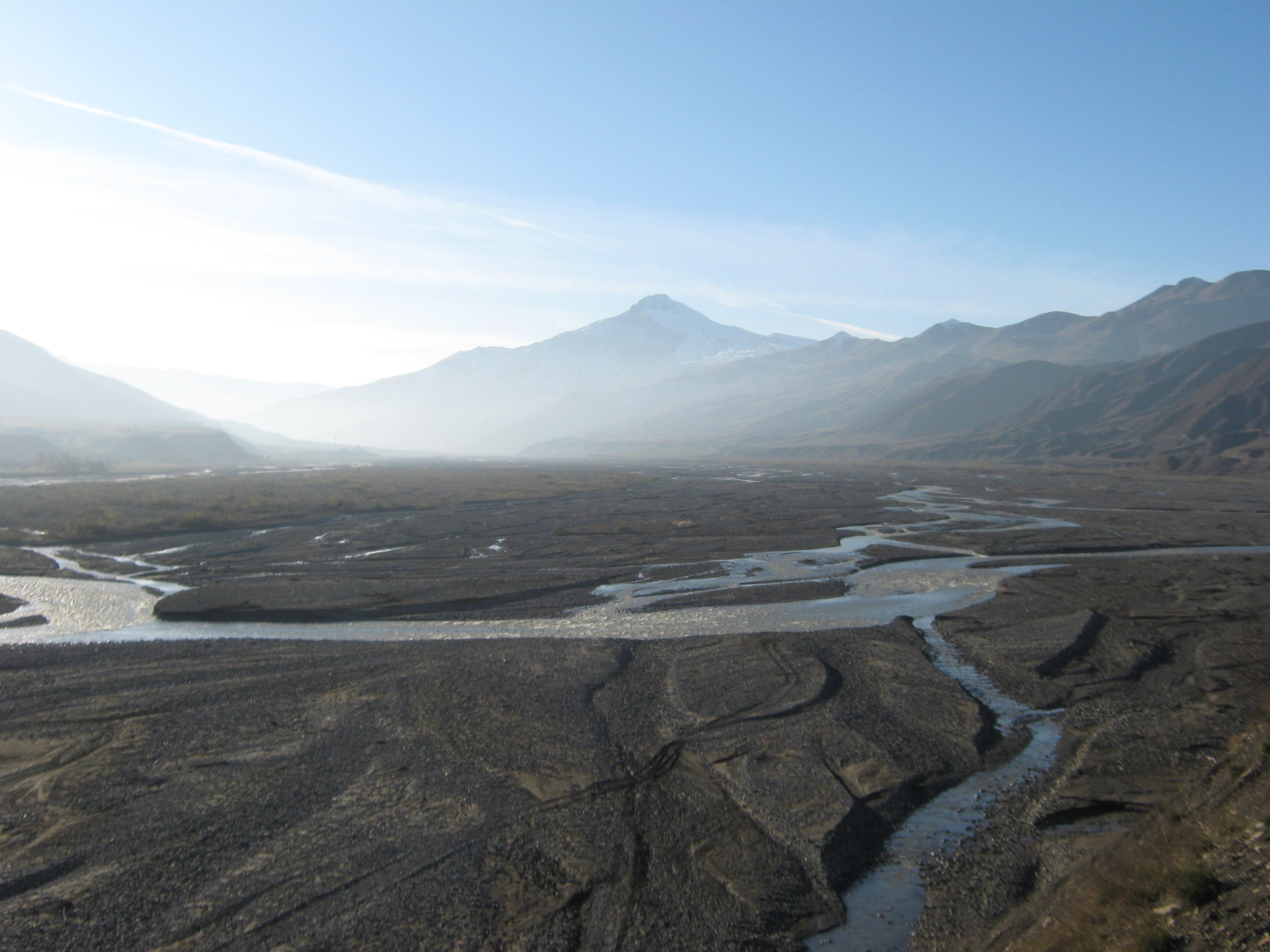 Долина реки Самур